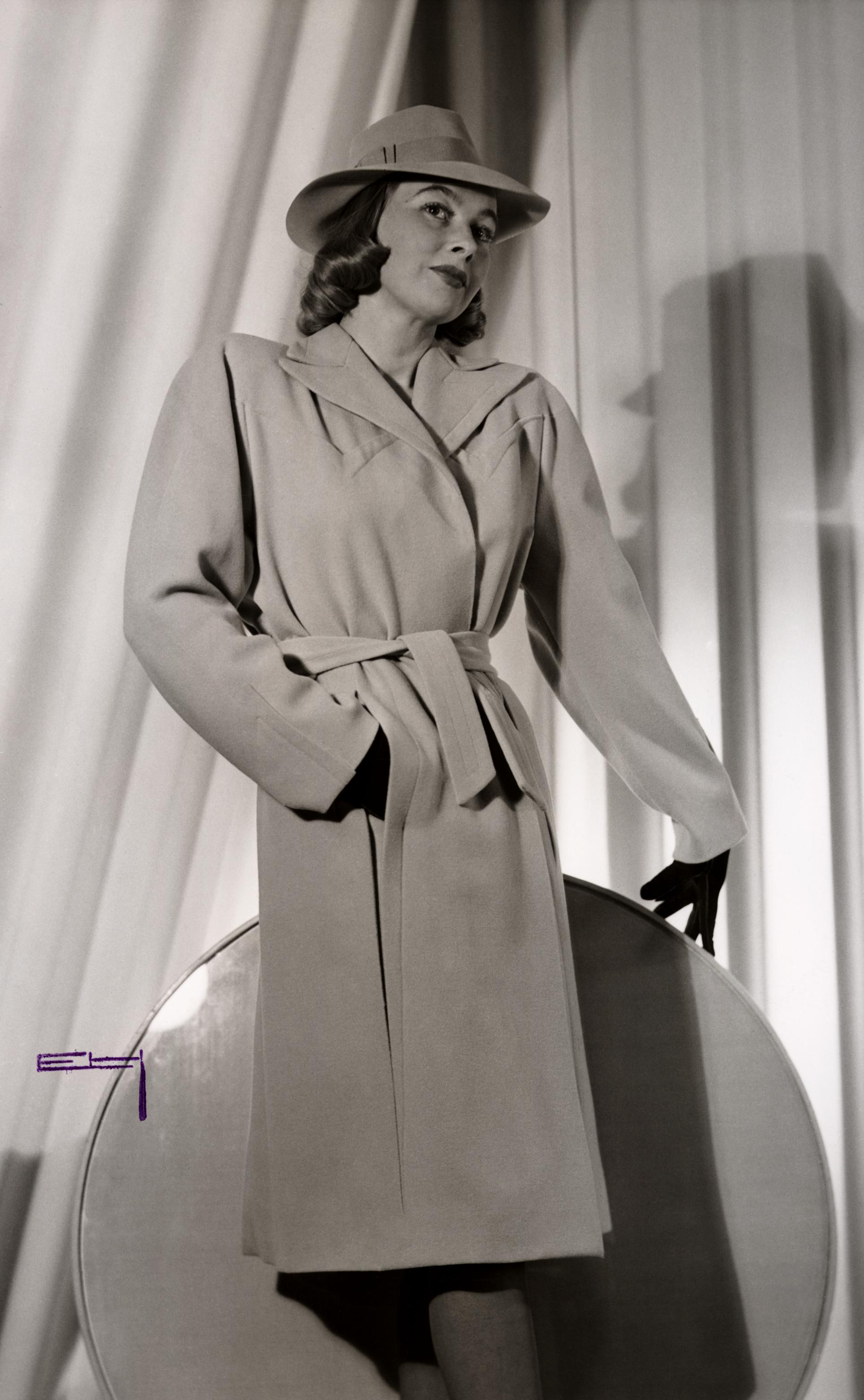 Visning på NK:s Franska, Nordiska Kompaniet mars 1943. En kvinnlig modell poserar iklädd kappa och hatt. Ämnesord: Kläder : Huvudbonad, Kläder : Ytterkläder, Kvinna, Mode.